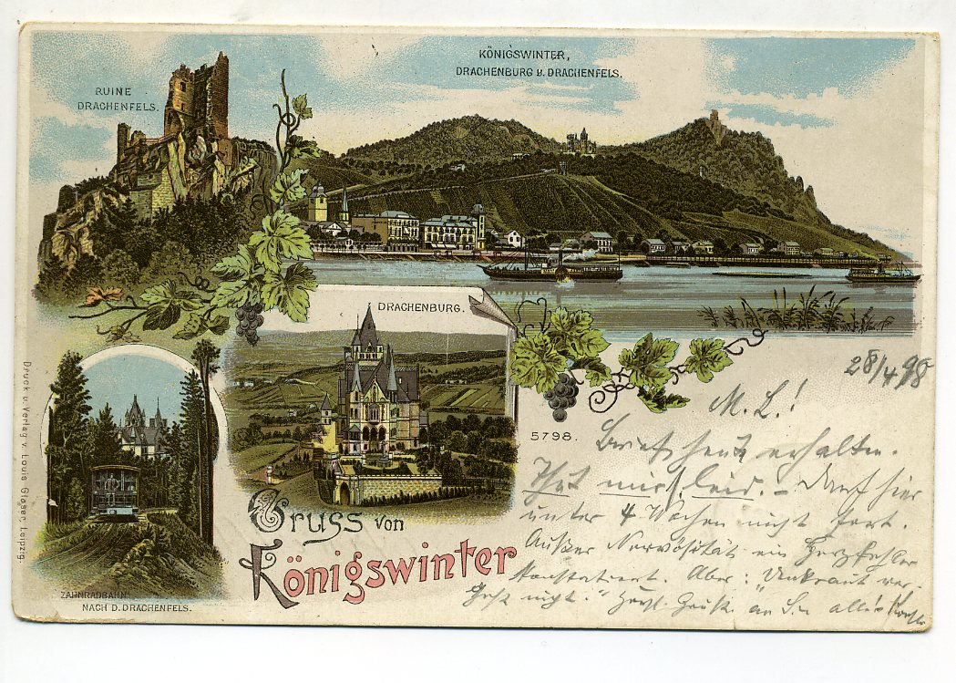 Gruss von Königswinter -Ruine Drachenfels- Drachenburg - Zahnradbahn nach d. Drachenfels